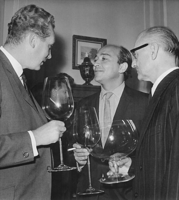 Karlsbad, Filmfestival, Beyer, Reiss, Brousil Zentralbild-Hochneder 6.7.1964 14. Internationales Filmfestival in Karlovy Vary DDR Regisseur Frank Beyer, der englische Regisseur Karel Reiss und A. Brousil, Präsident der Jury (v.l.n.r.) unterhalten sich auf einem kleinen Cocktailempfang, den der Präsident des Festivals Adolf Hoffmeister am 7.7.1964 in Karlovy Vary gab. Abgebildete Personen: Beyer, Frank: Regisseur, DDR (GND 119217899) Brousil, Antonin M. Prof.: Rektor der Akademie der musischen Künste, CSSR Reiss, Karel: Regisseur, England #